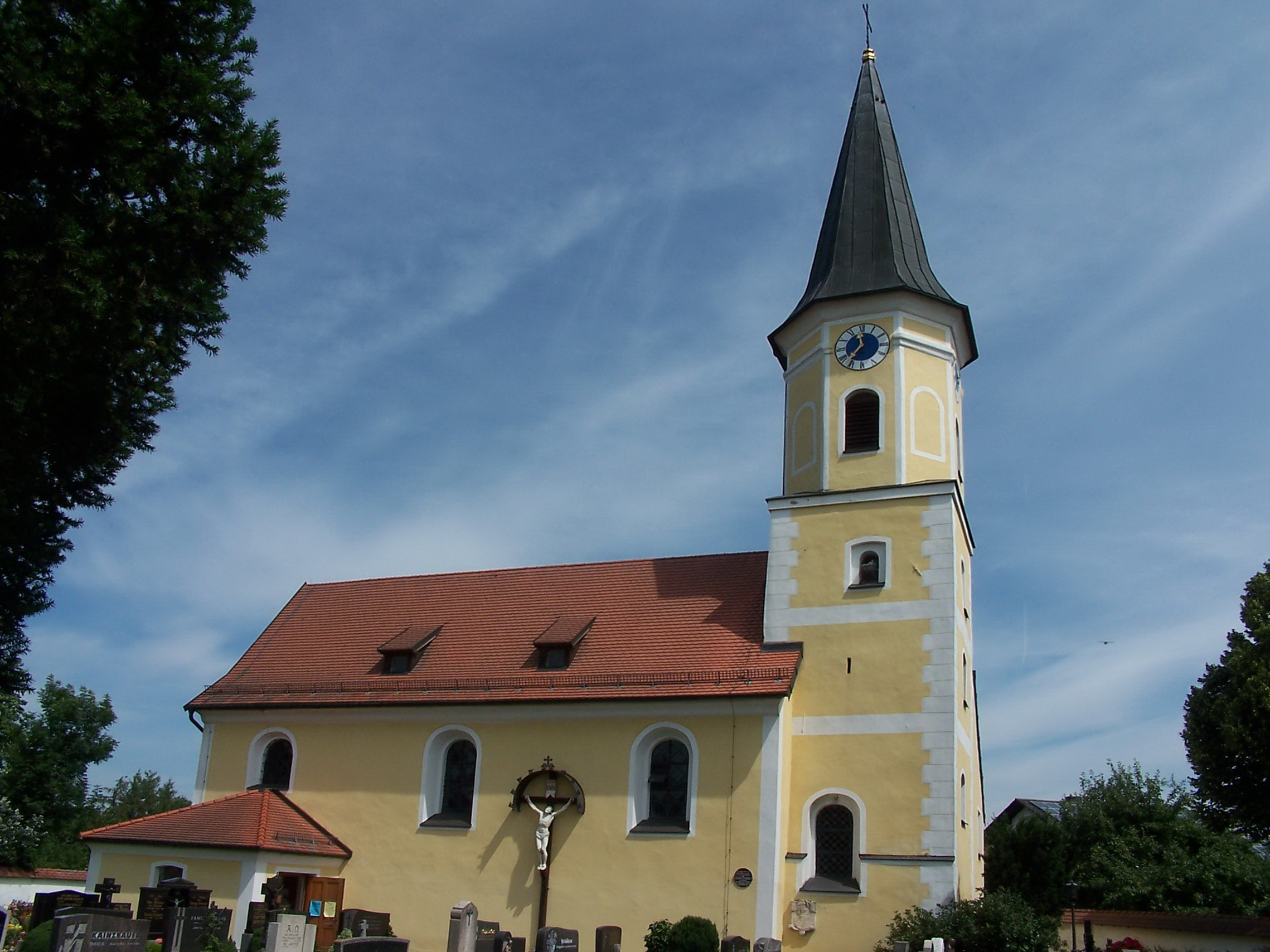 Wörth an der Donau. Kiefenholz. Kath. Filialkirche Jakobus d.Ä. Ansicht von Süden.